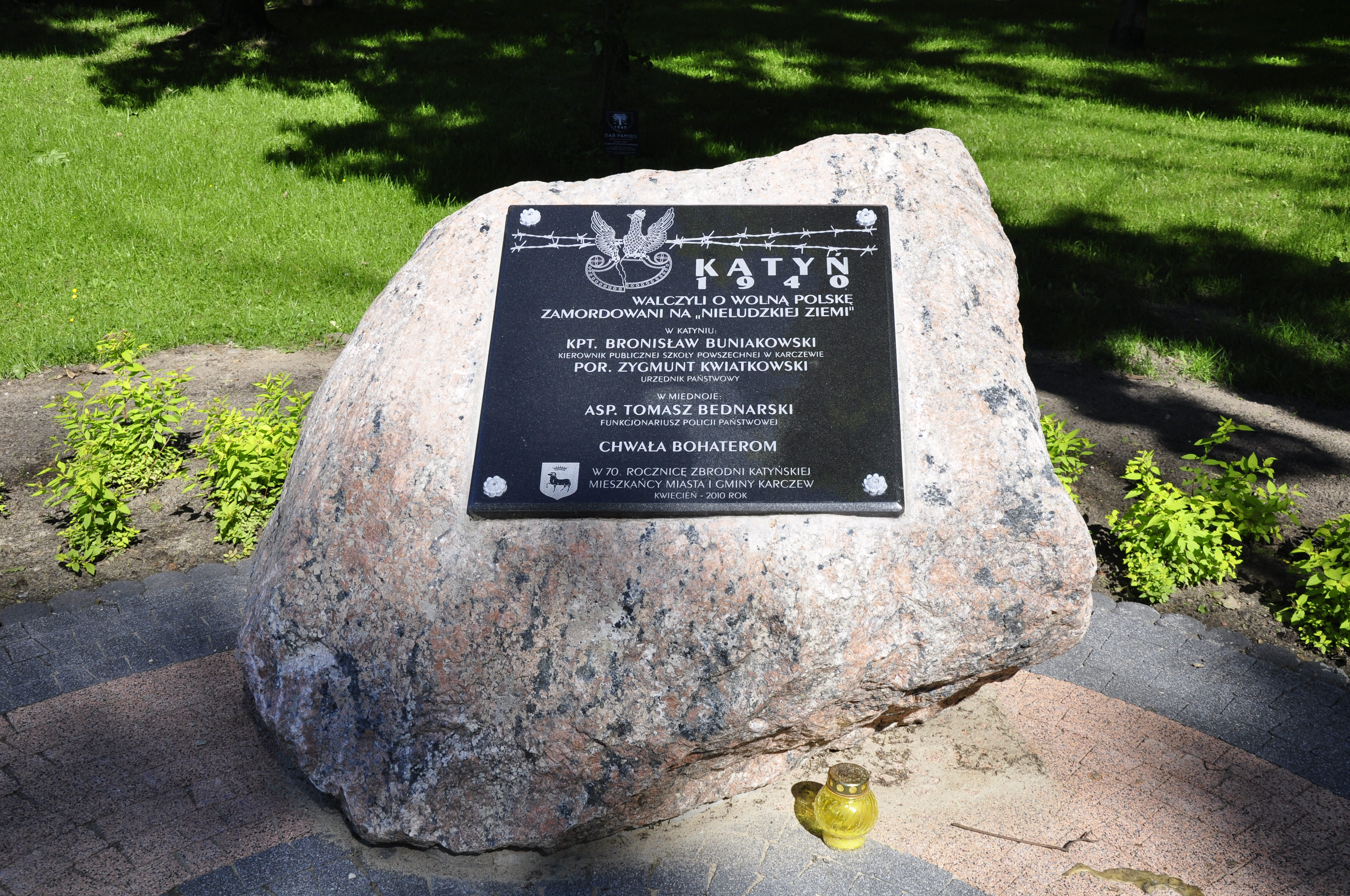 Kirche Karczew